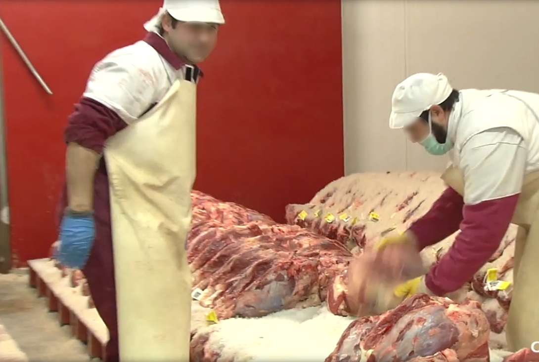 Visita a Cecinas Pablo en Astorga. This is a retouched picture, which means that it has been digitally altered from its original version. Modifications: Blurred faces.